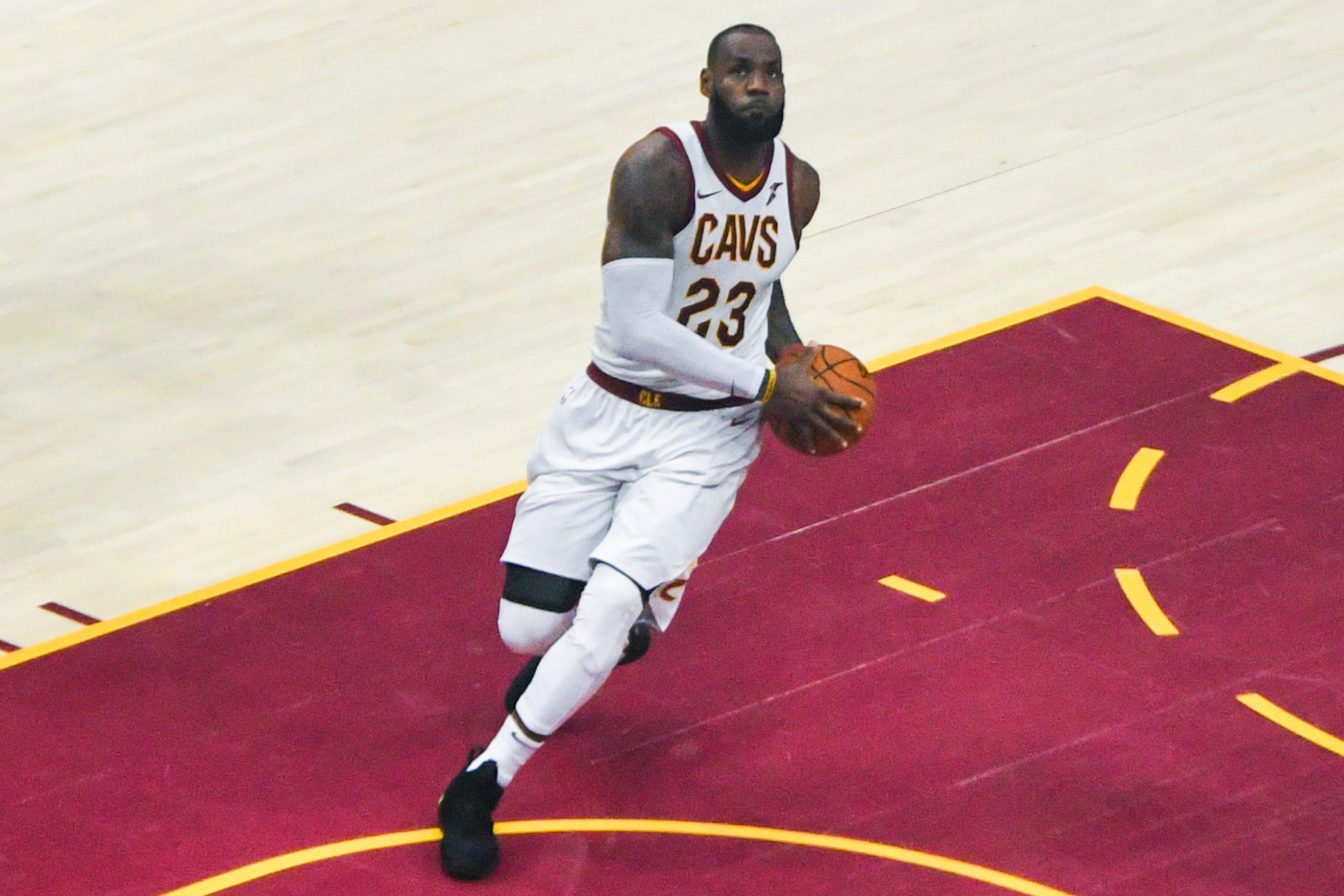 LeBron James